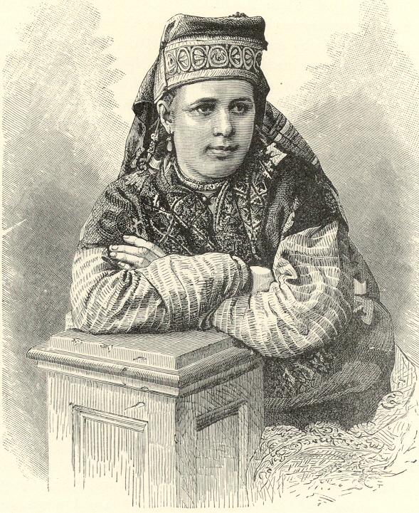 'PORTRAIT OF A GREAT RUSSIAN TYPE WOMAN'. 'Nouvelle Geographie Universelle La Terre et les Hommes V : L' Europe Scandinave, Russe etc.' by Jacques Elisee Reclus, published in Paris by Hachette & Cie., 1880